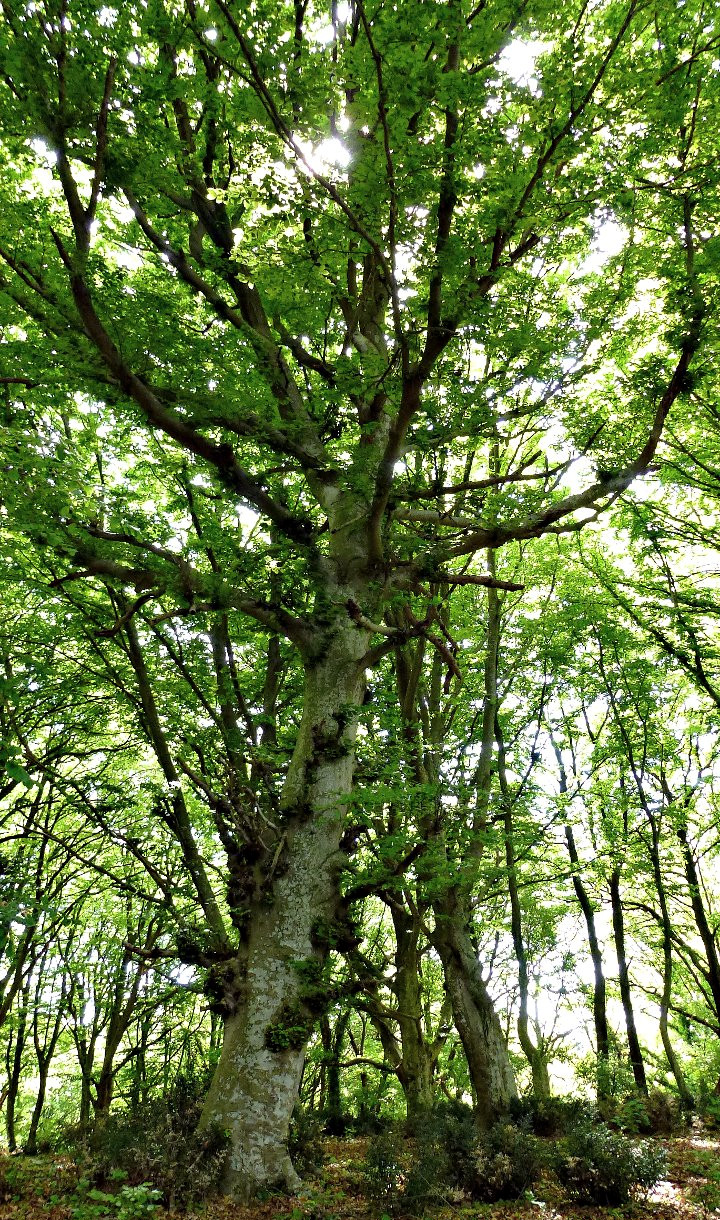 Il "faggio del piccione", nei pressi della vetta di Monte Raschio, faggeta vetusta depressa di Monte Raschio.